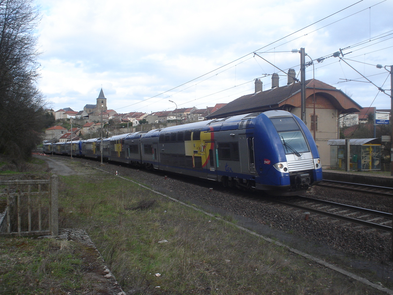 Rame Z24500 quittant la gare de Hombourg-Haut